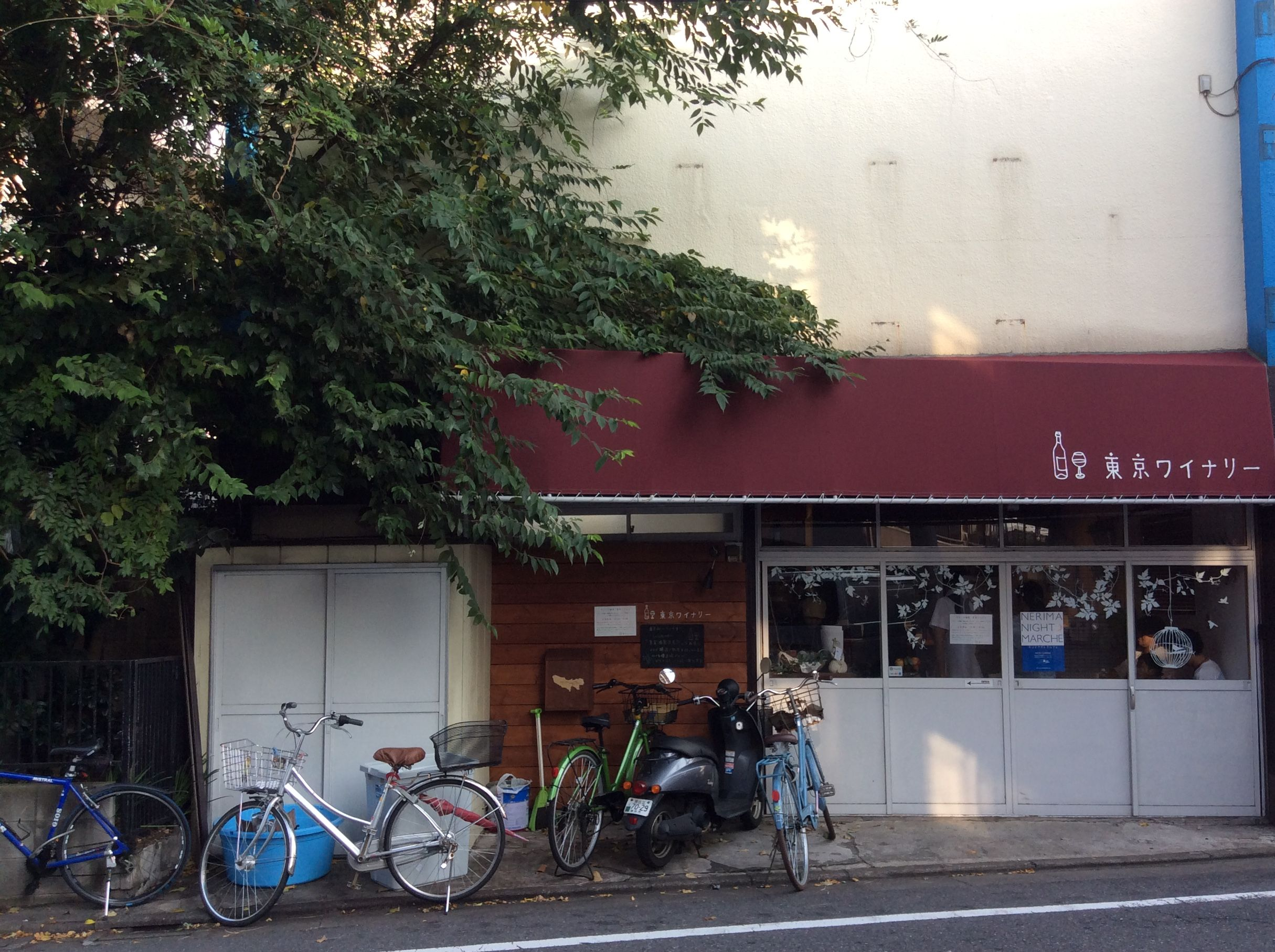 （2025年10月24日撮影）